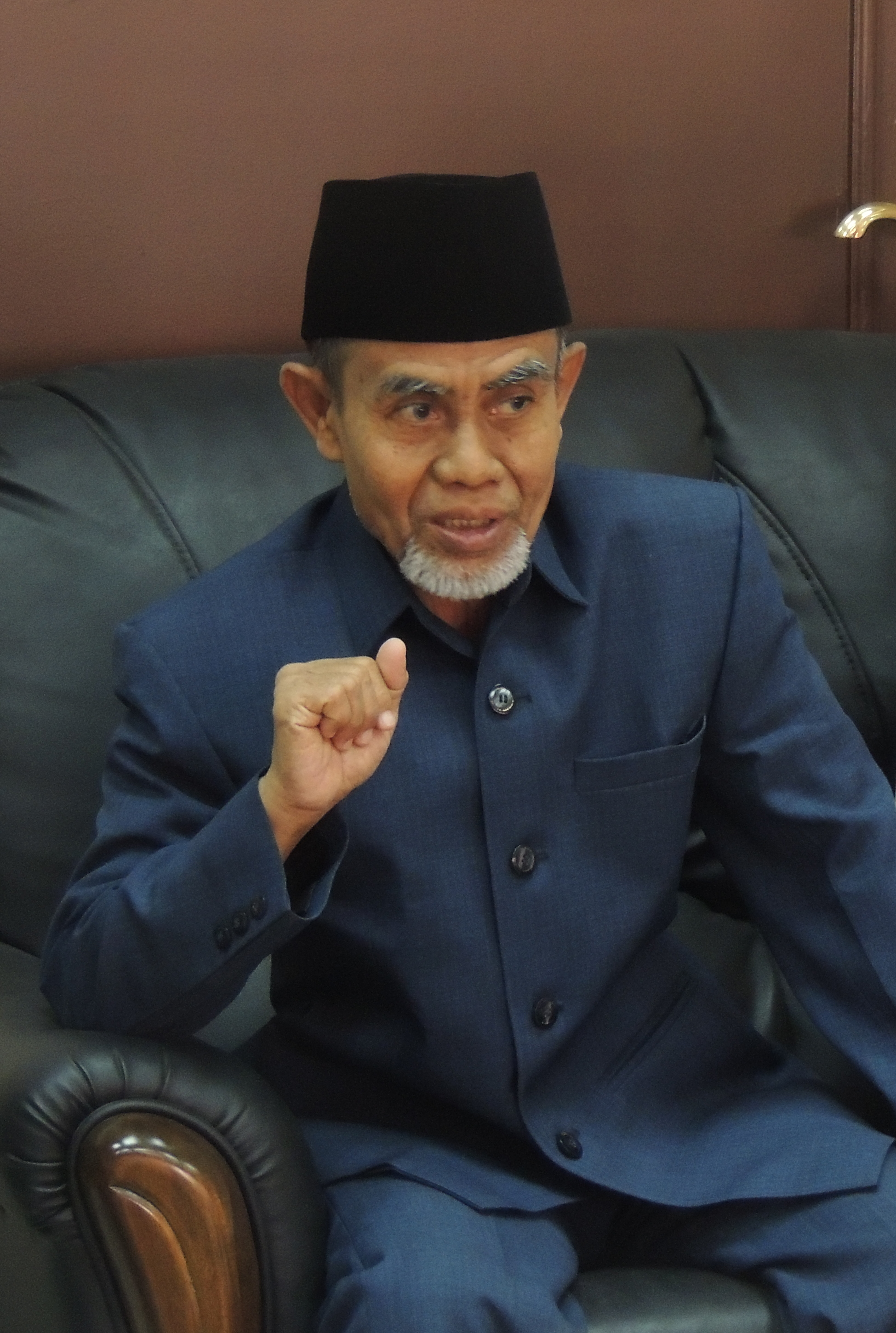 Foto ini diambil saat kyai hasan berada di mekkah untuk umroh pada januari-februari 2014.